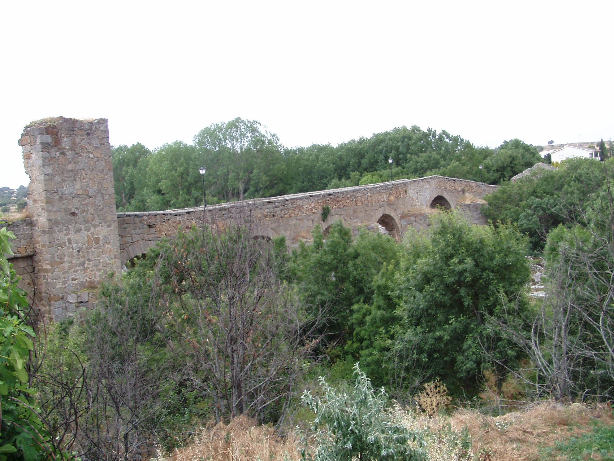 Puente medieval de la villa salmantina de Puente del Congosto